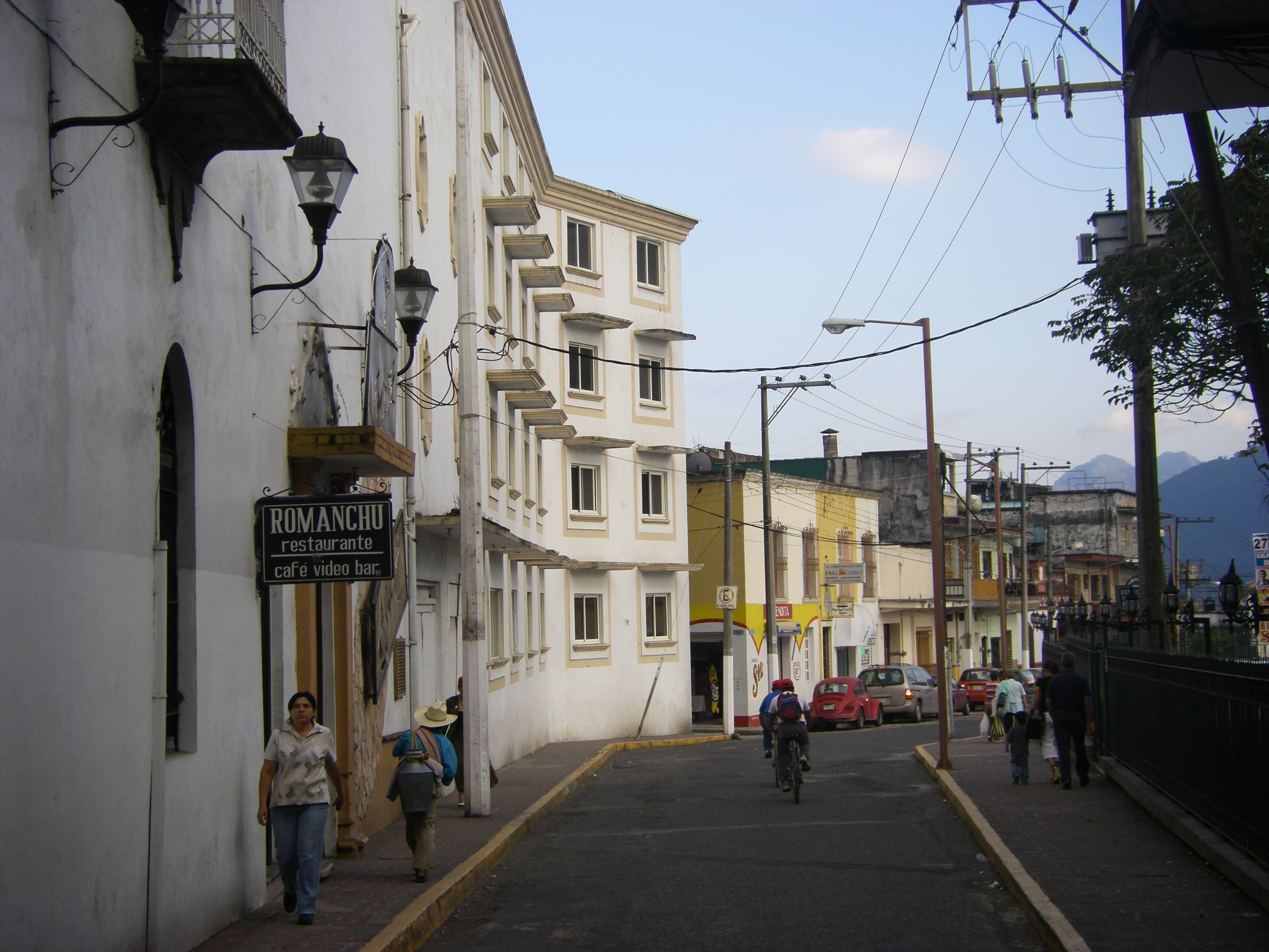 Straße in Orizaba, Mexiko